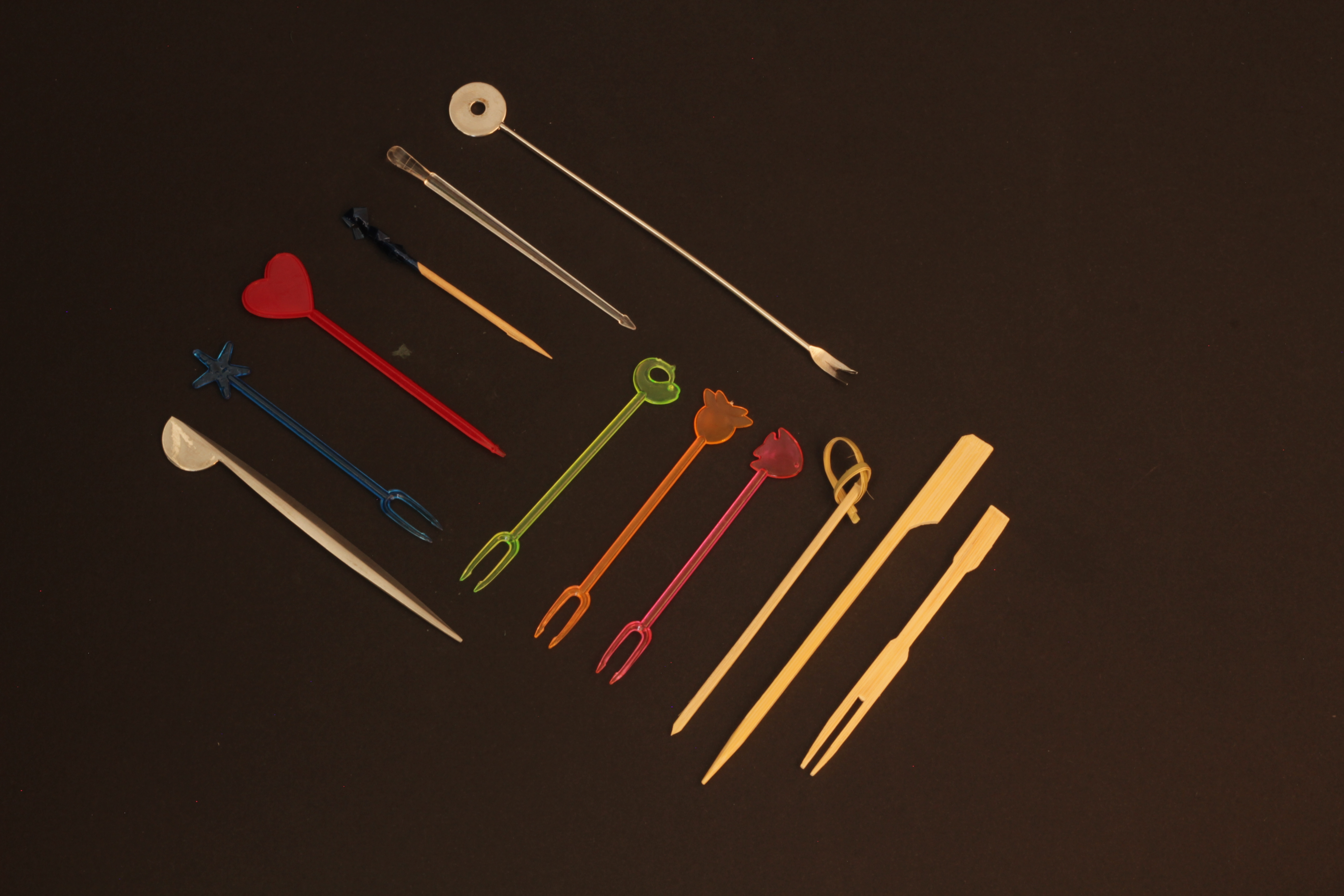 verschiedene Picker